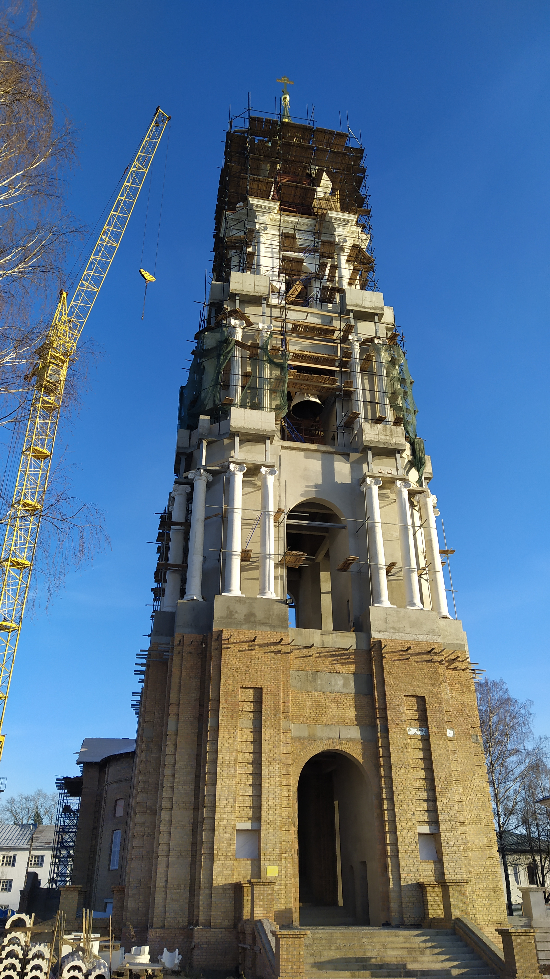 Восстанавливаемый Костромской Кремль